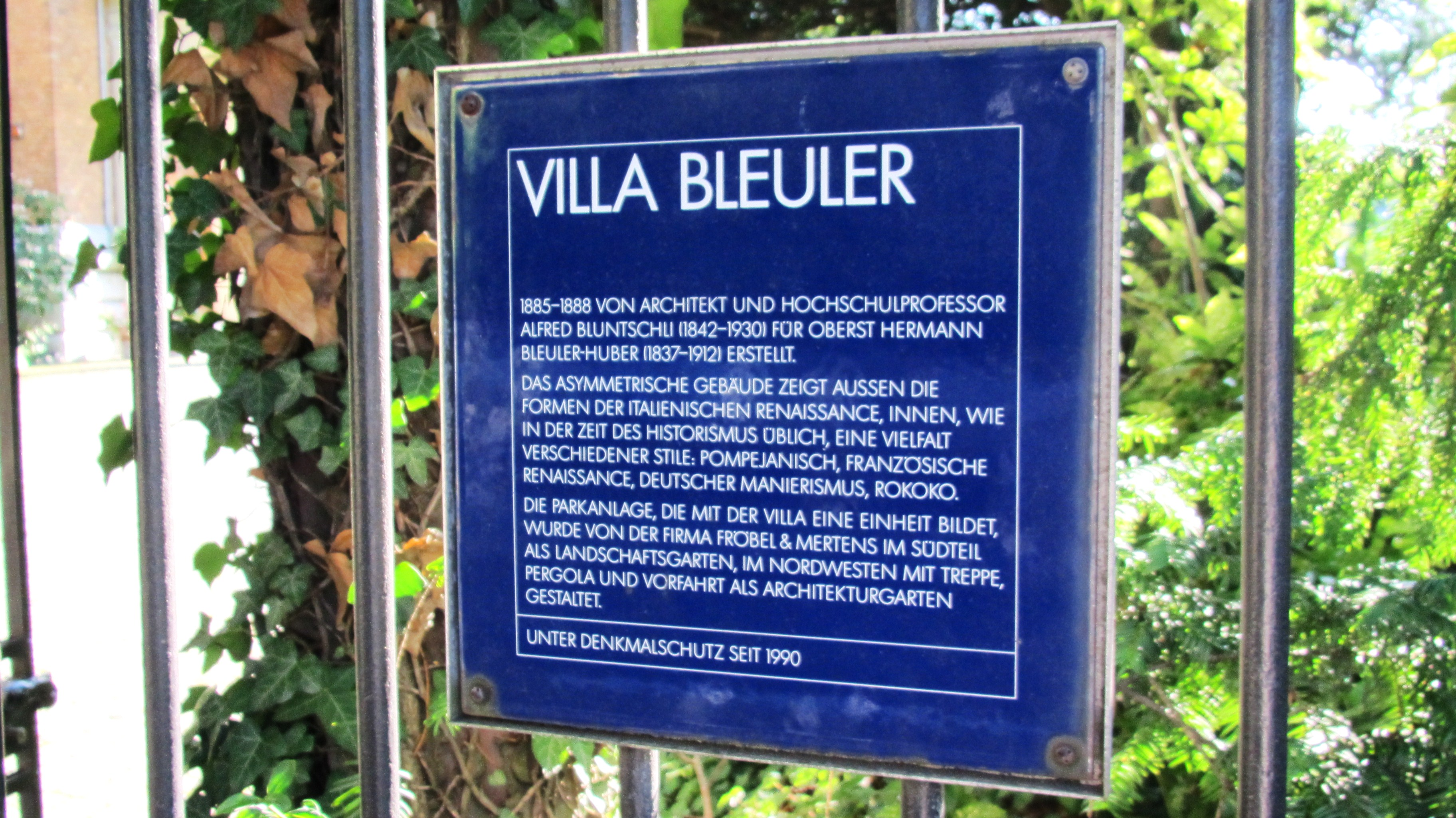 Zürich, Villa Bleuler mit Parkanlage, Zollikerstrasse 32